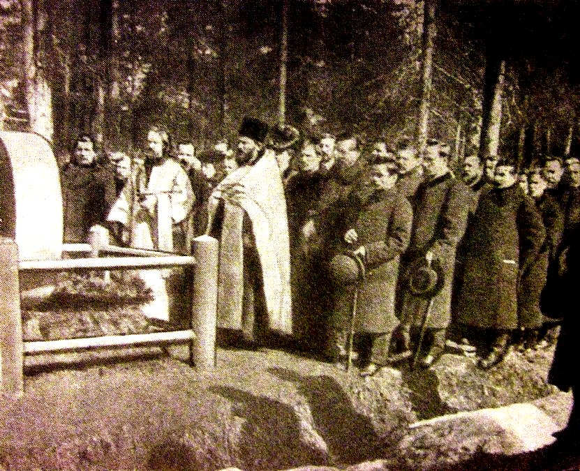 Панихида на могиле убитого священника Георгия Гапона. Успенское кладбище под Петербургом, 1906 или 1907 г.